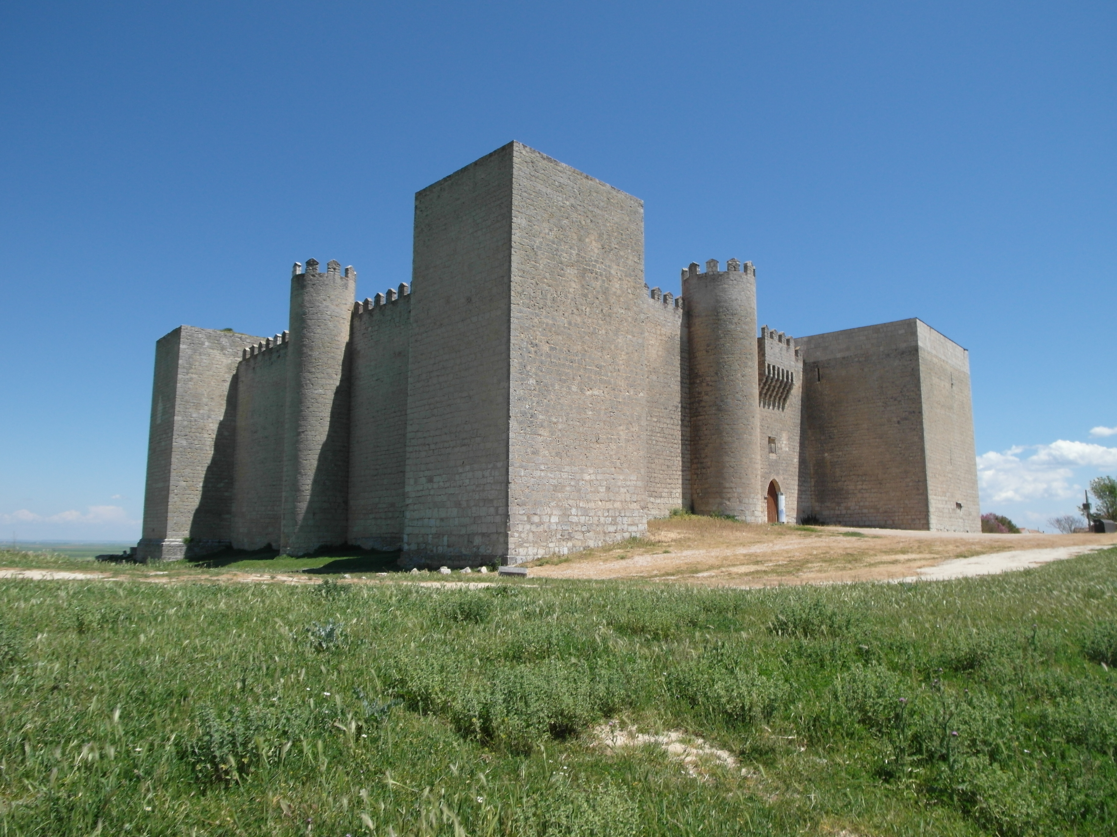 Montealegre de Campos, Valladolid.